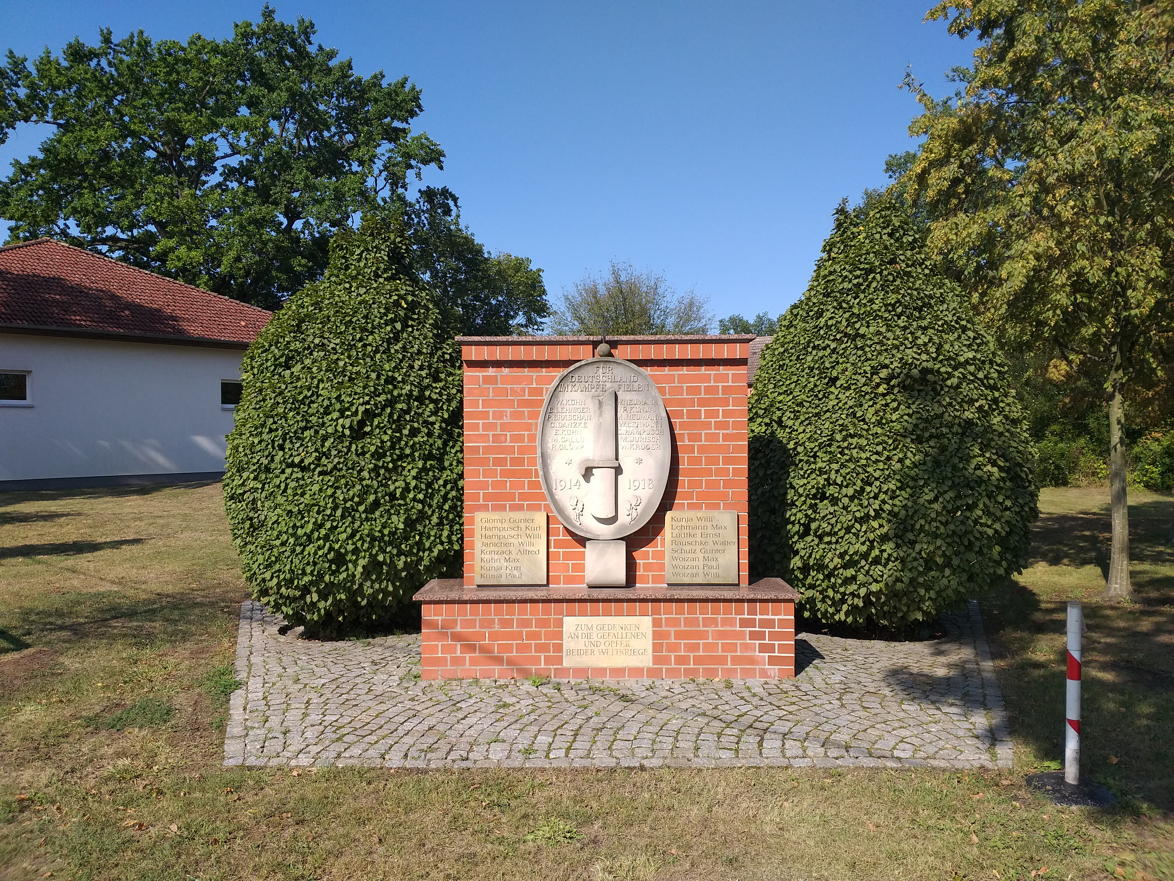 Gefallenendenkmal in Neuendorf, einem Ortsteil der Stadt Lübben im Landkreis Dahme-Spreewald in Brandenburg.